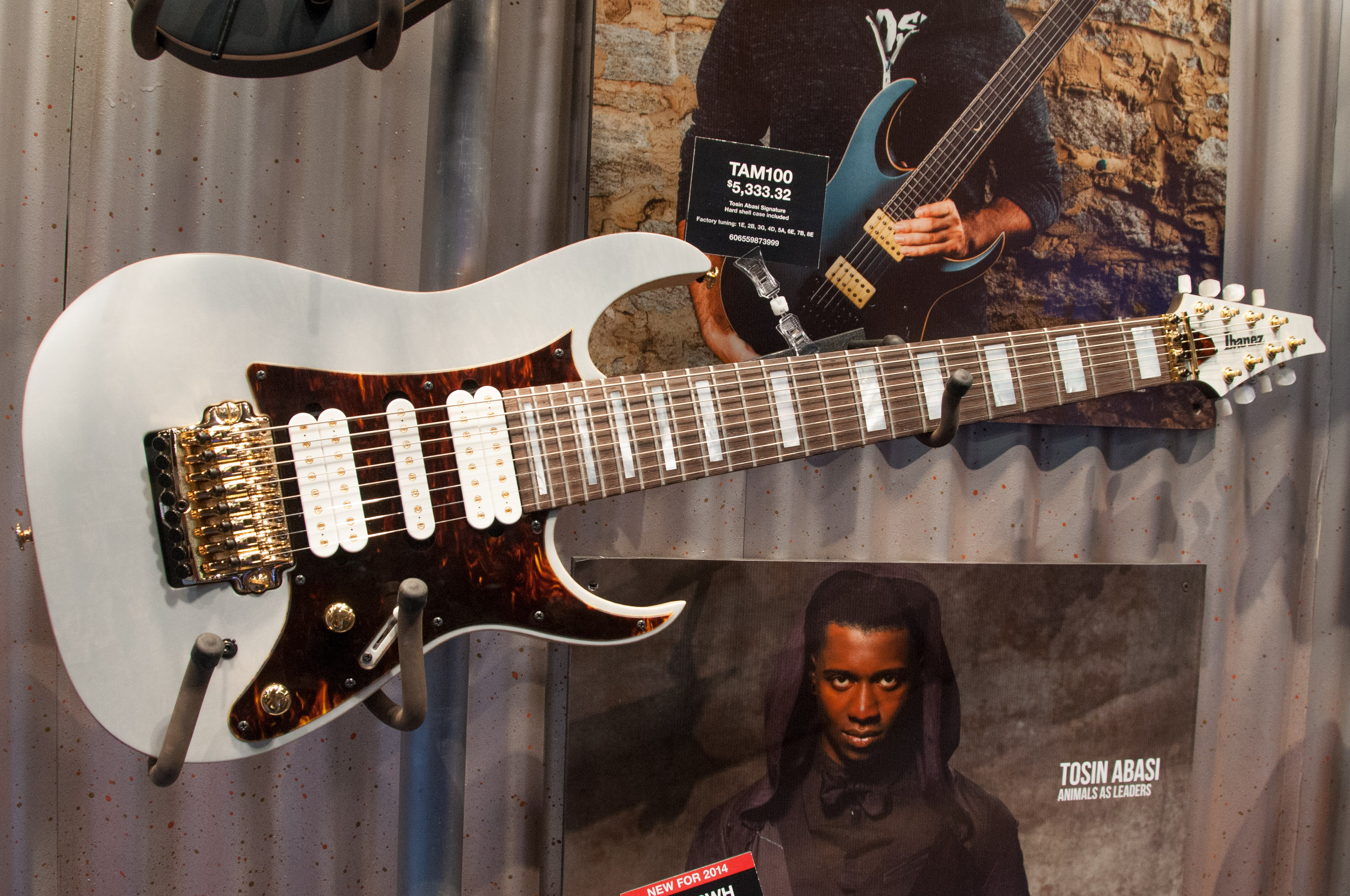 Ibanez TAM100 guitar